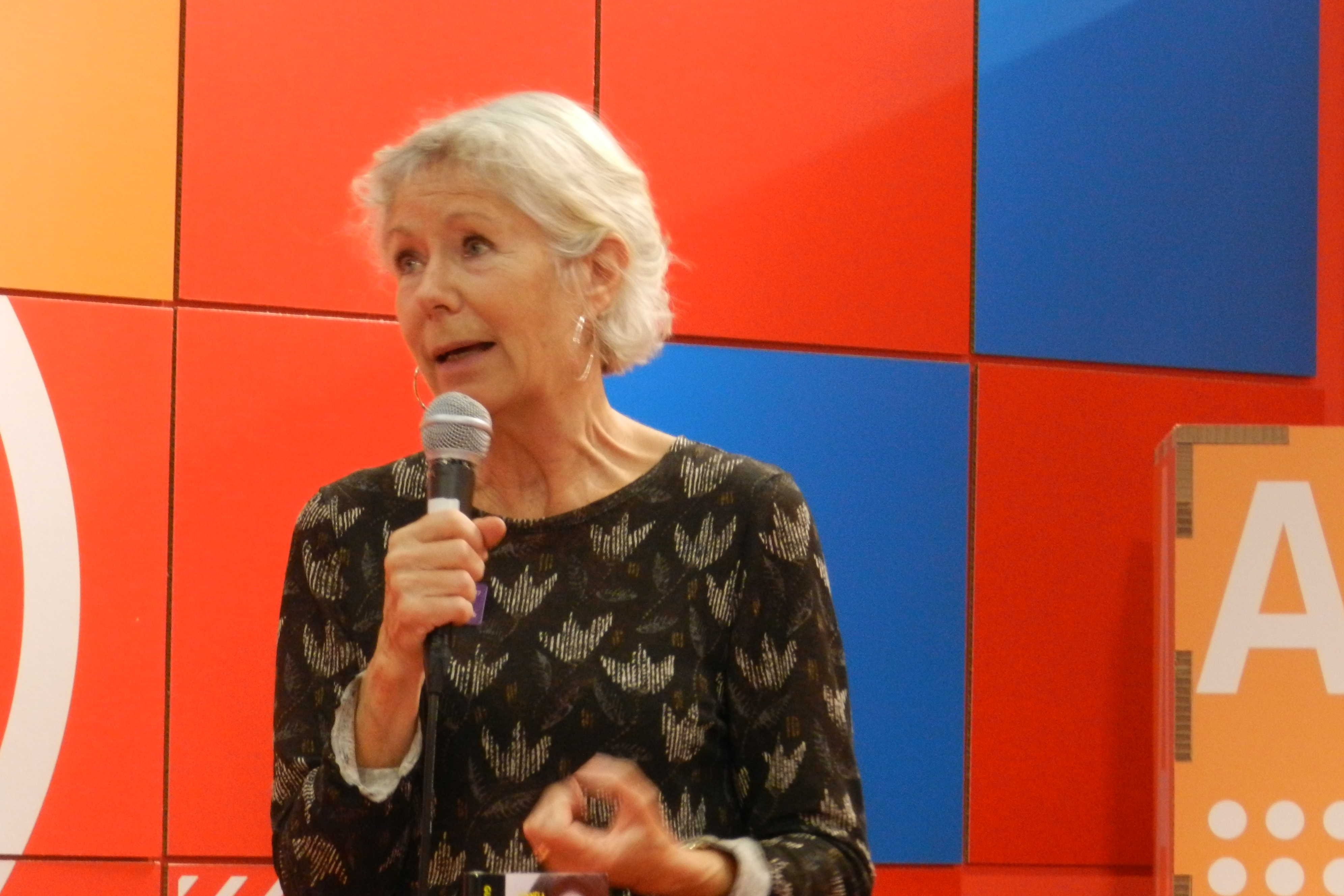 Gunnela Björk på Bokmässan i Göteborg 2017.